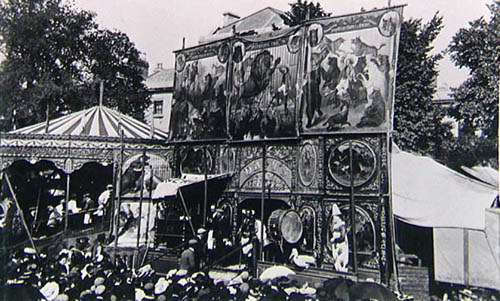 Day's Menagerie auf der St. Giles Fair in Oxford, 1895